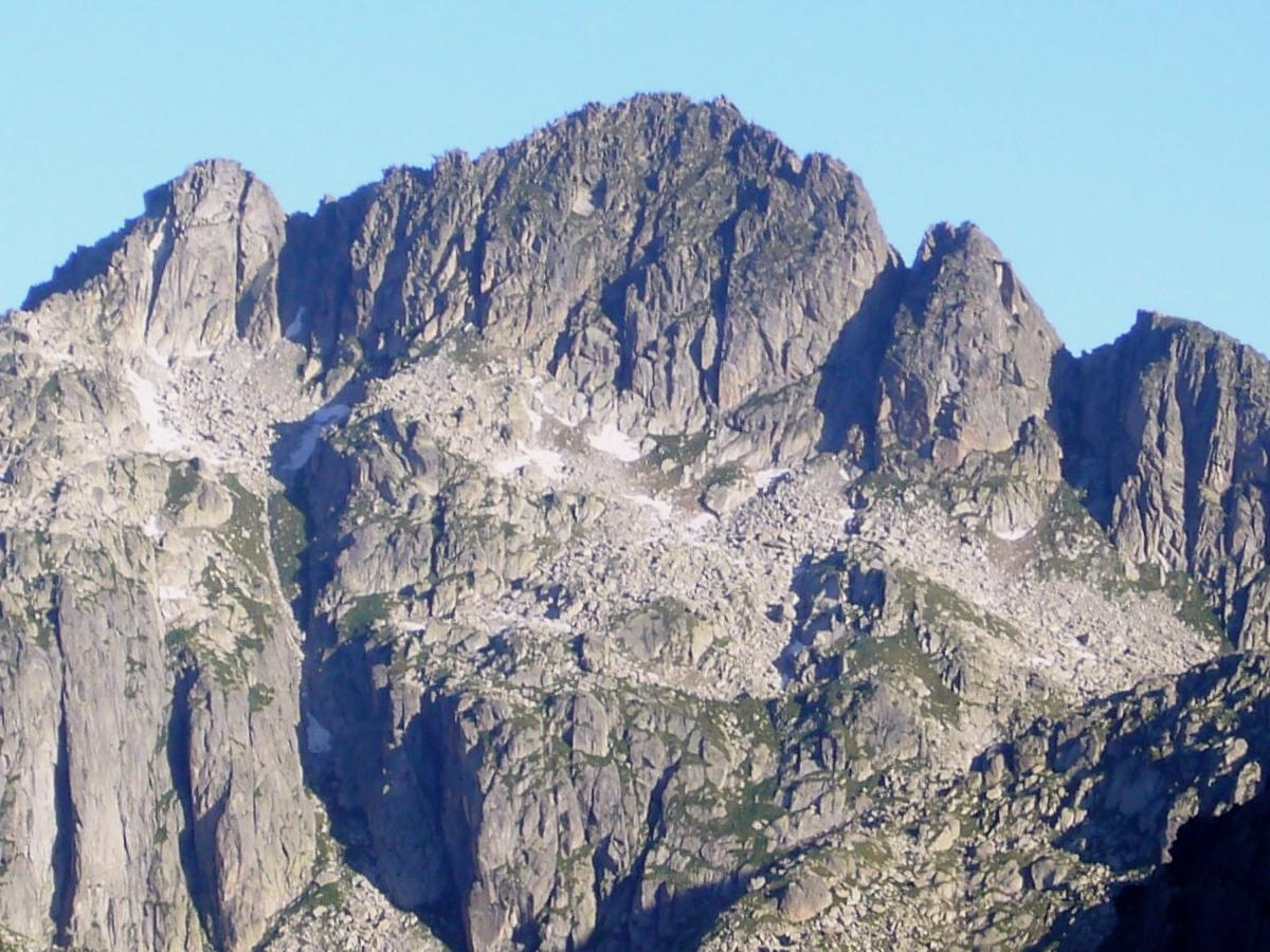 Tumeneia vist des de la Vall de Colieto; la Vall de Boí, Alta Ribagorça, Catalunya